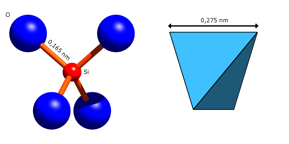 Granatstruktur: SiO4-Tetraeder basierend auf Strukturdaten von synthetischen Grossular bei Raumtemperatur